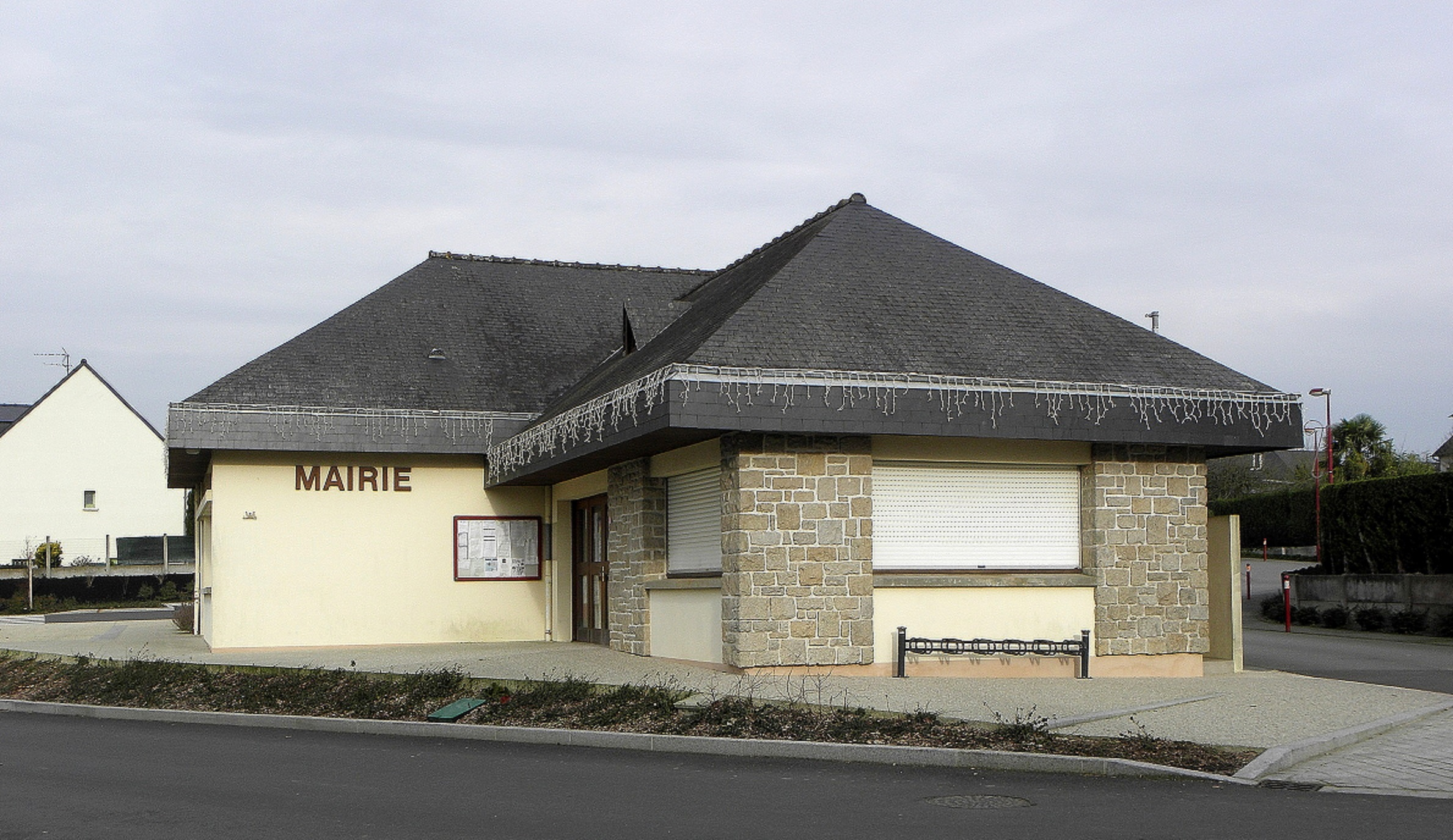 Mairie de Landavran (35).